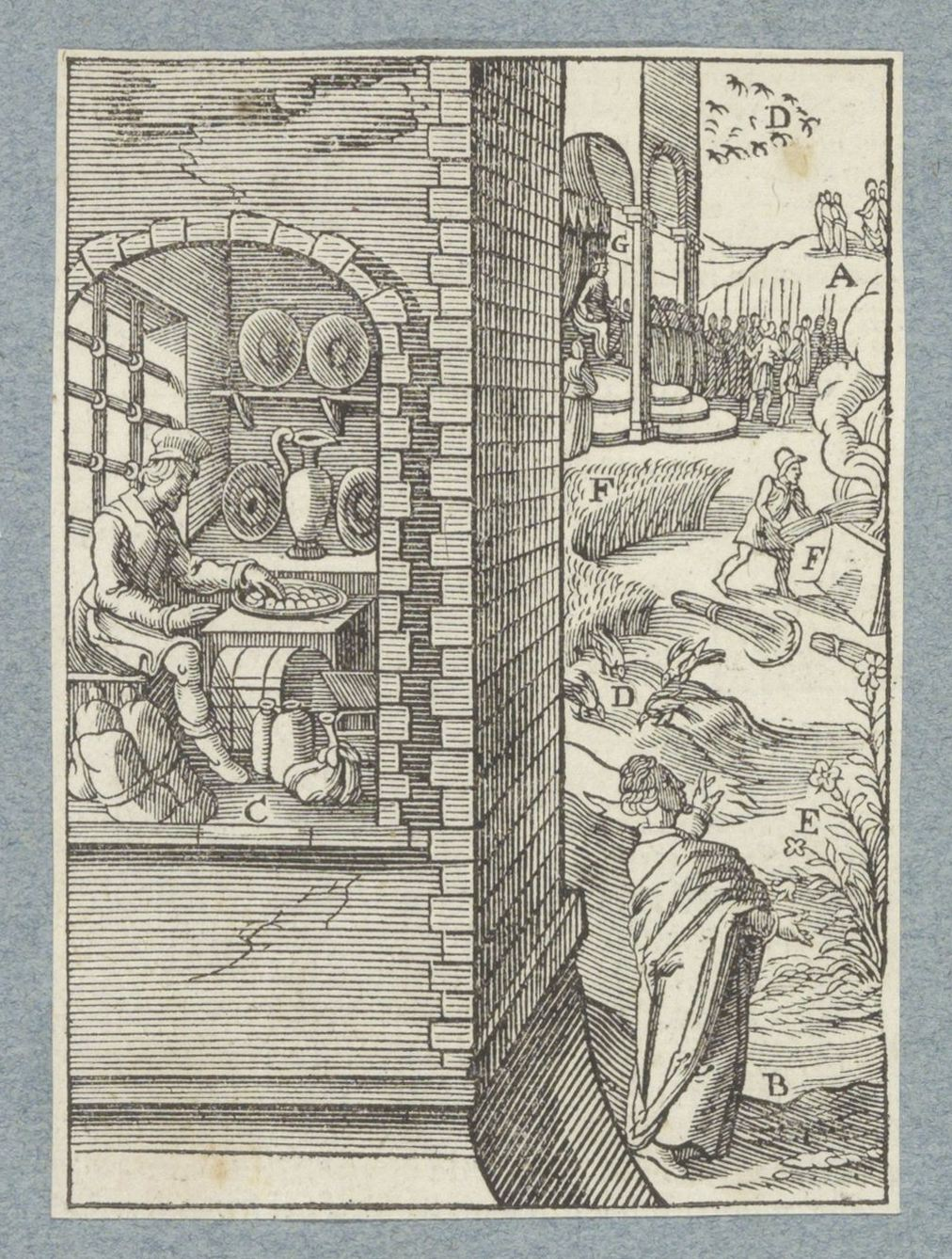 IdentificatieTitel(s): God én de mammon dienen gaat nietObjecttype: prent boekillustratie albumblad Objectnummer: RP-P-2015-17-61-2Omschrijving: De gelovige kijkt naar de vogels in de lucht, de lelies in het veld. Hij maakt zich nergens zorgen over omdat hij weet dat God de Vader voor hem zorgt. De huichelaar zit te midden van aardse rijkdommen in een vertrek zijn geld te tellen. Bij verschillende elementen uit de voorstelling staan letters. De prent maakt deel uit van een album.VervaardigingVervaardiger: prentmaker: Christoffel van Sichem (II)naar prent van: Karel van Mallerynaar ontwerp van: Bernardino Passeriuitgever: Pieter Jacobsz. PaetsPlaats vervaardiging: AmsterdamDatering: 1629Fysieke kenmerken: houtsnede geplakt op albumblad; verso met tekst in boekdrukMateriaal: papier Techniek: houtsnede / boekdruk / plakkenAfmetingen: prent: h 104 mm × b 74 mmToelichtingDe prent is afkomstig uit een van de uitgaven van P.J. Paets uit Amsterdam. De prent wordt voor het eerst gebruikt in: Der Zielen Lust-hof. Leuven, I.Jacbosz voor P.J. Paets [= Amsterdam, P.J. Paets], 1629. De voorstelling is gekopieerd naar een prent van Karel van Mallery voor: Nadal, Jerónimo. Evangelicae Historiae Imagines. Antwerpen, M. Nutius, 1593.OnderwerpWat: 'you cannot serve God and mammon' ~ doctrine of Christ on possessions (Matthew 6:24; Luke 16:13)Verwerving en rechtenVerwerving: onbekend 1936Copyright: Publiek domein